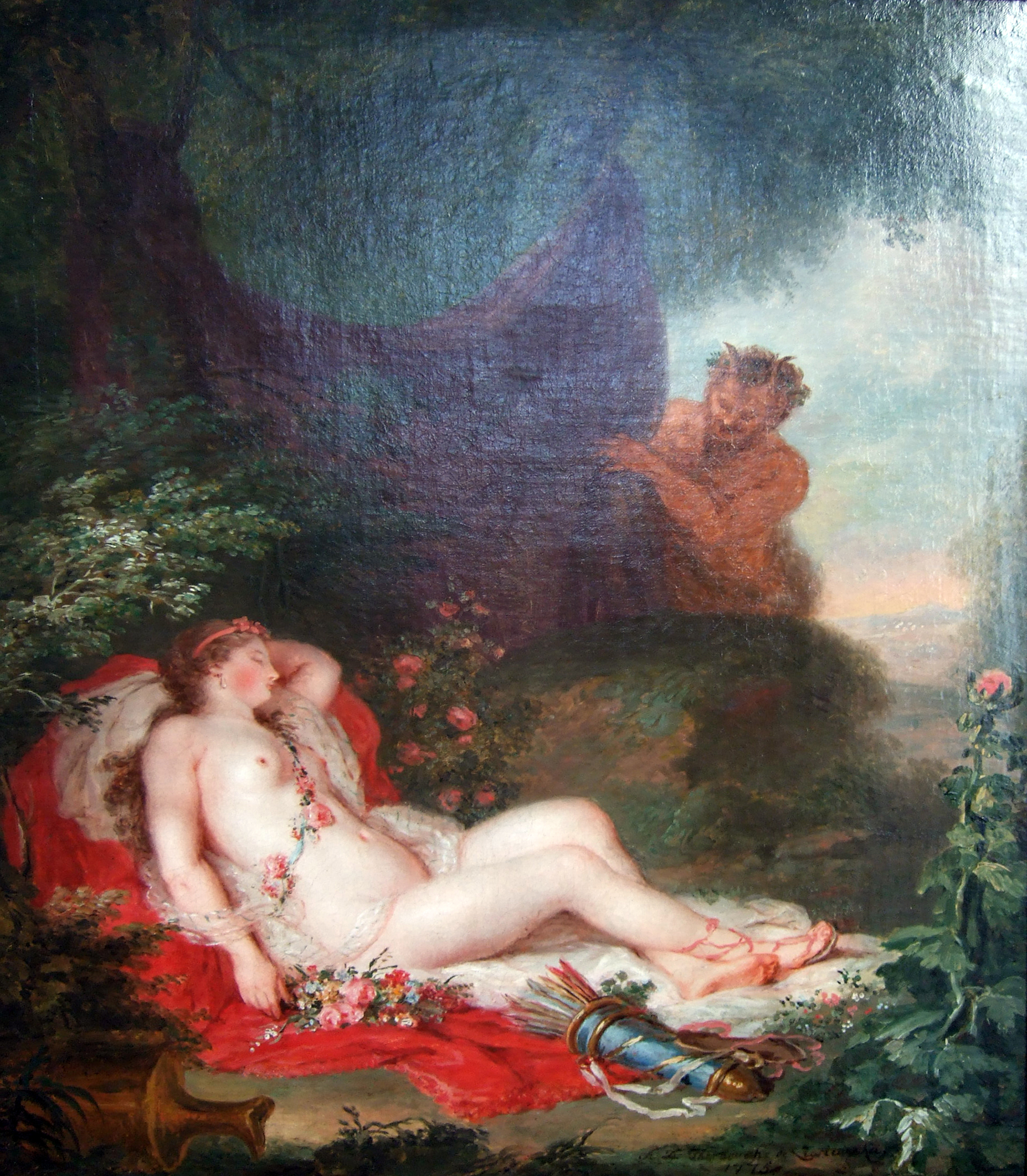 Jupiter und Antiope, von Anna Dorothea Therbusch, 1775. Jupiter nähert sich in Gestalt eines Satyrs Antiope, Tochter des Nykteus, Königs von Theben. Die schlummernde Schönheit ahnt noch nichts von dem bevorstehenden gewaltsamen Akt und dem daraus resultierenden tragischen Schicksal. - Ausgestellt in Schloss Friedrichsfelde (Standort des Stadtmuseums Berlin)